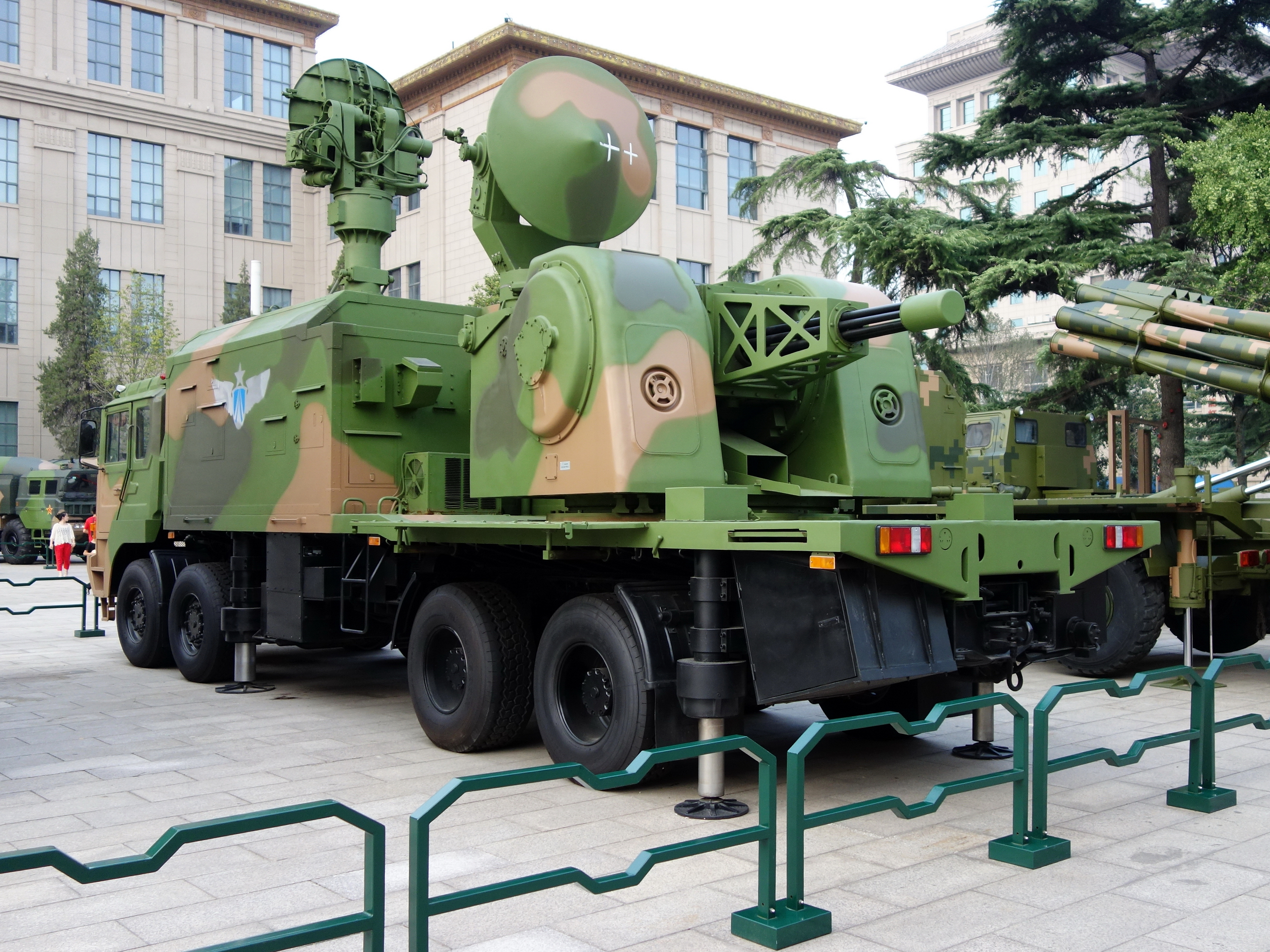 红旗6A型（HQ-6A）弹炮防空武器系统高炮车，拍摄于中国人民革命军事博物馆。